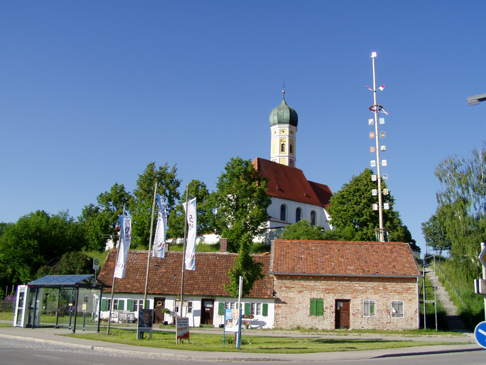 Armenhaus und Pfarrkirche in Lindenberg, Buchloe